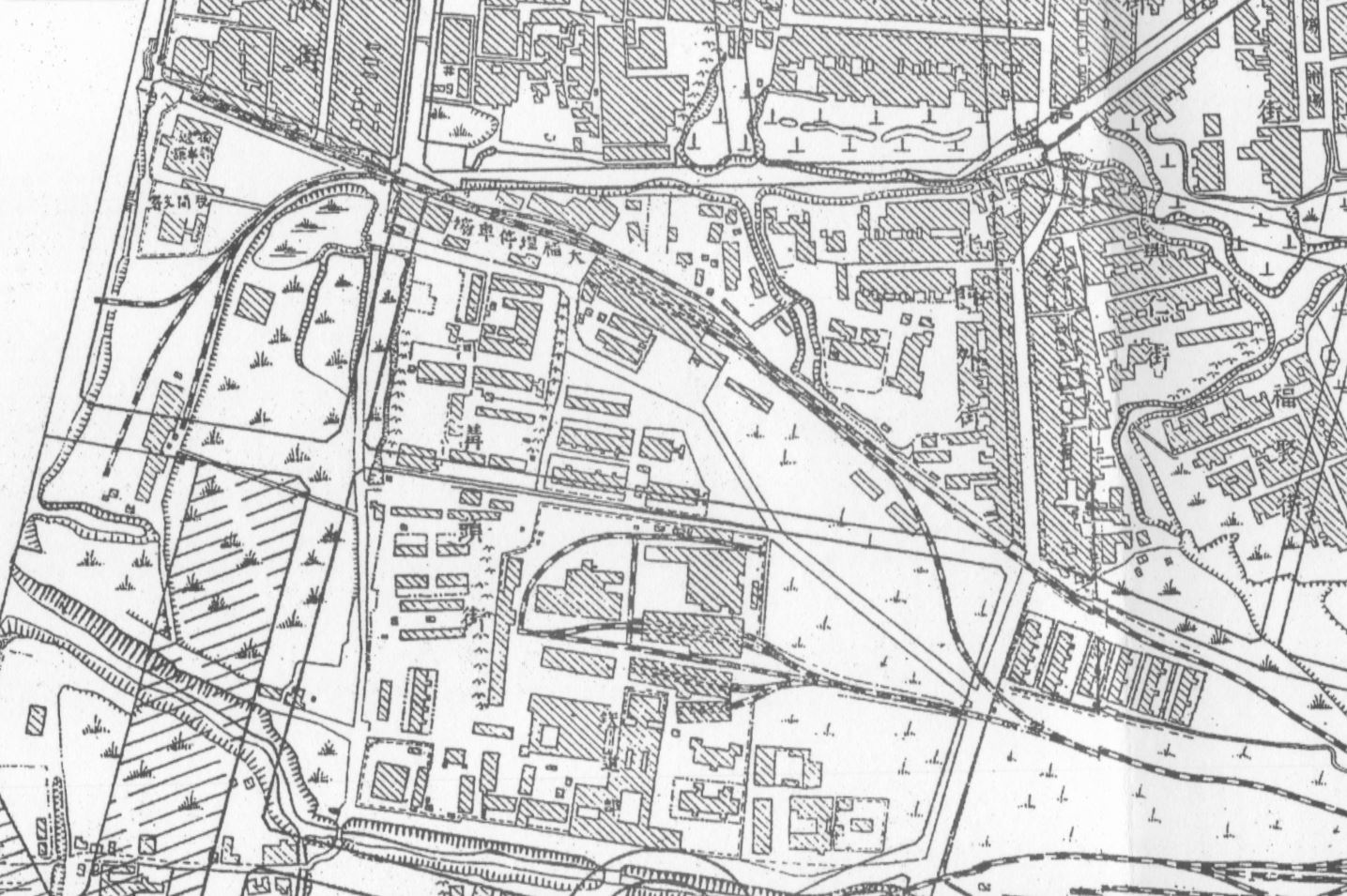 臺灣鐵路 (清朝)大稻埕車站地圖